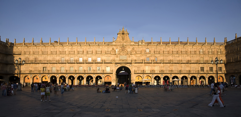 unidentified Spain